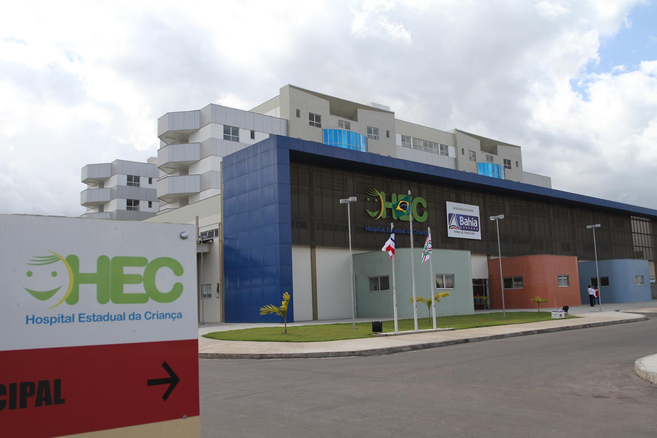 Hospital Estadual da Criança em Feira de Santana (Bahia)